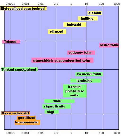 Aerosoolide hulgas on väga erineva tekke ja suurusega osakesi. Diagrammil on toodud bioloogiliste aerosoolide, tolmude, tahkete ja gaasiliste saasteainete näiteid ning nende suurusvahemikud mikromeetrites (10-6m) väljendatult.